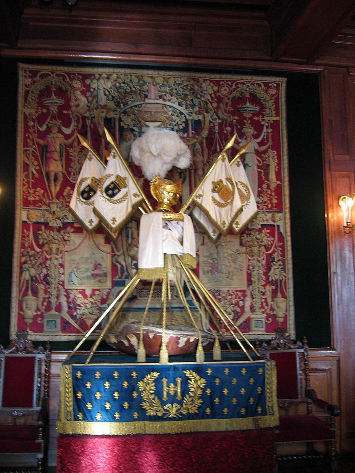 Carapace-berceau supposé d'Henri IV (1,70 m de longueur - 1,07 m selon d’autres sources - et 0,83 m de largeur) en écaille de tortue : sur une table recouverte d’un tapis en velours de soie bleue brodé d’or, le berceau est surmonté d'un faisceau de lances entouré d'une couronne de laurier supportant un casque empanaché (le panache blanc en plumes d’autruche d'Henri IV) en bois doré et de drapeaux aux armes de France et de Navarre (Chambre du roi de Navarre - selon la tradition - au château de Pau, Pyrénées-Altantiques, France)